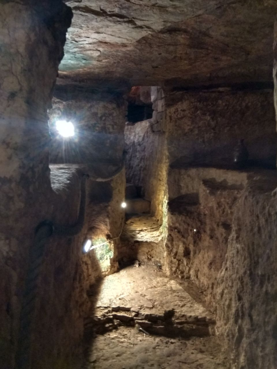 מרתף יין עתיק המתוארך לתקופת ההתנחלות, שהתגלה בגבעות עולם.